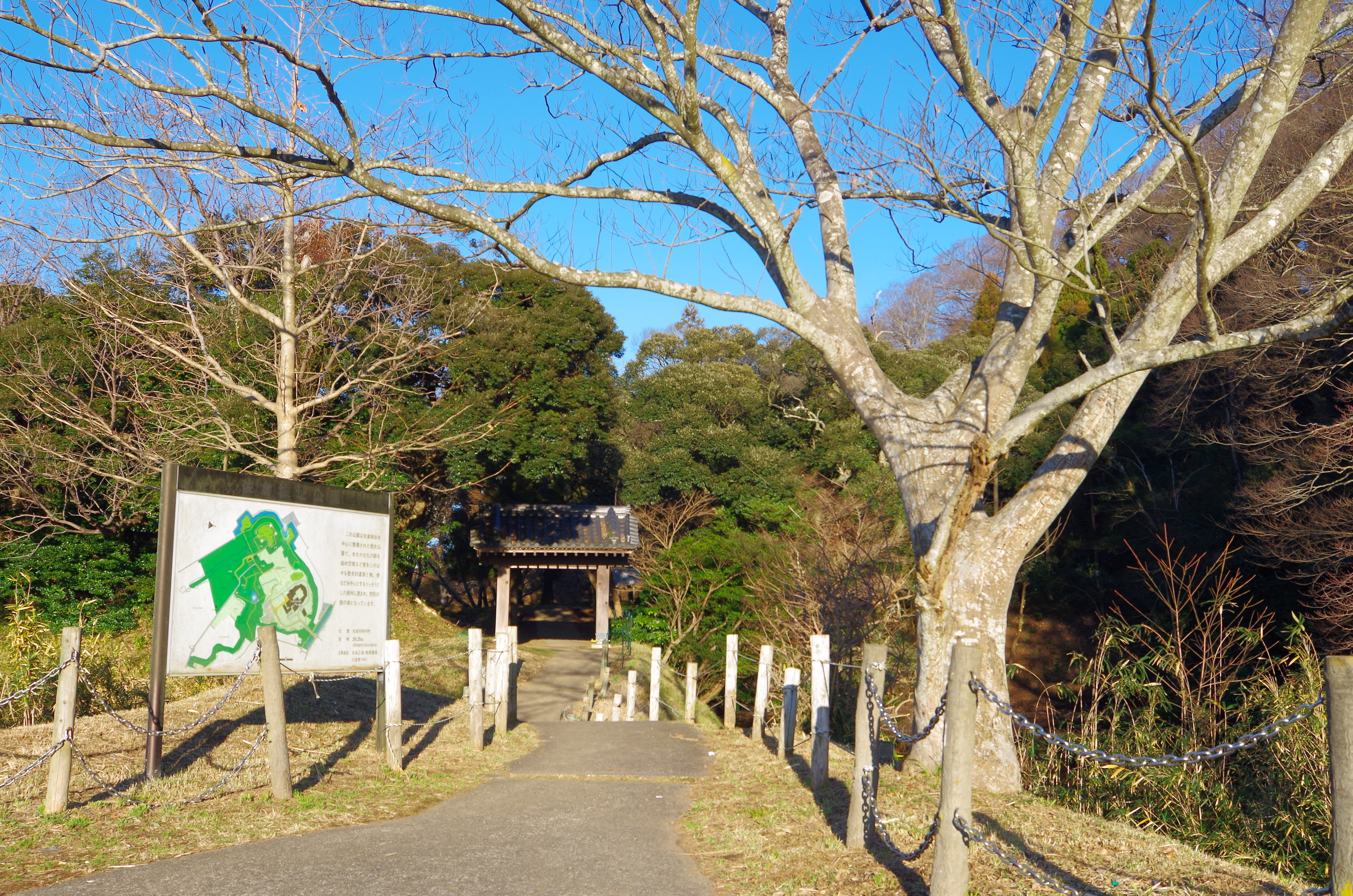 佐倉城址にて Sakura Castle 2015.1.02